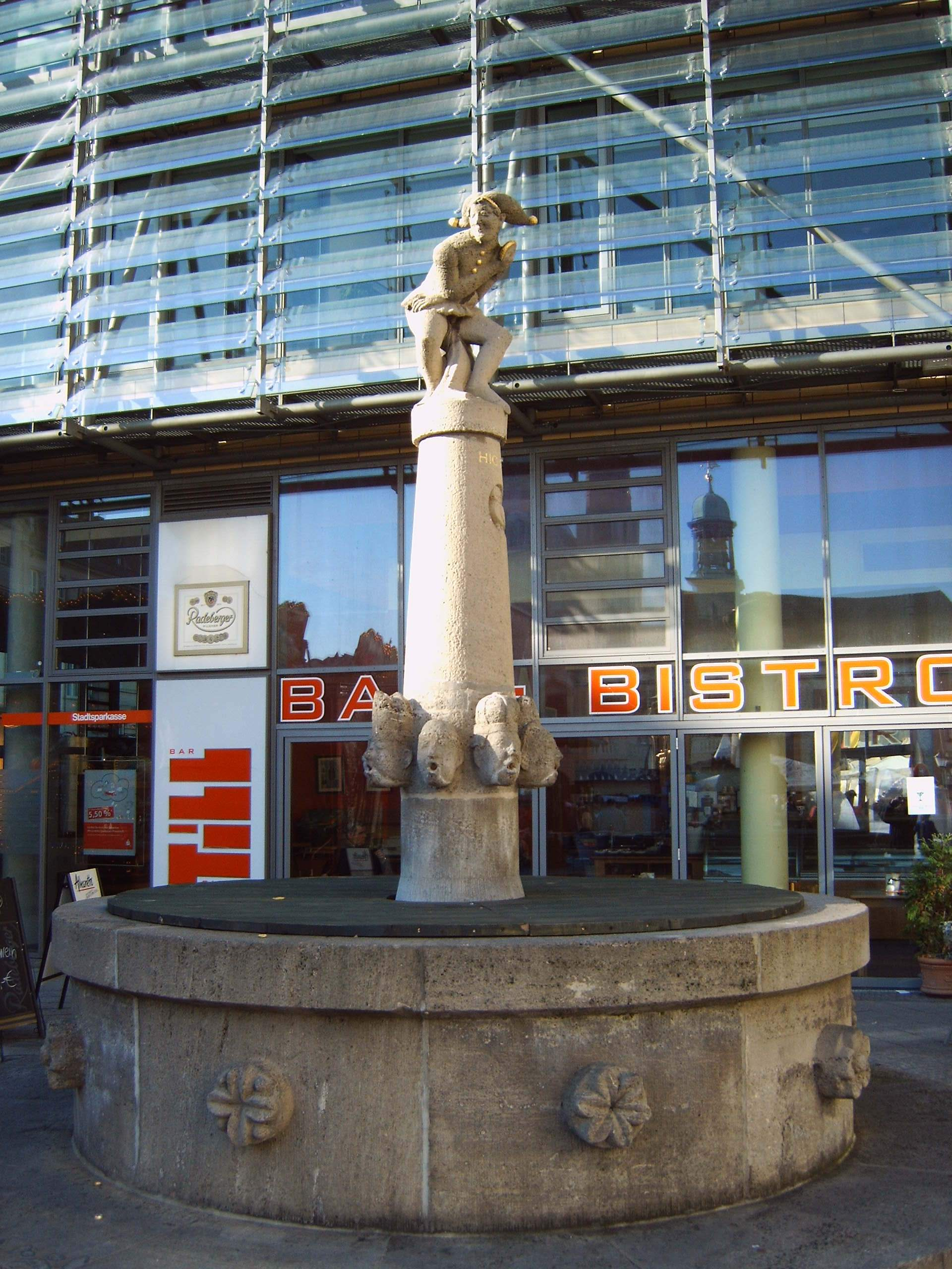 Eulenspiegelbrunnen, Alter Markt Magdeburg, am 6.11.2005, fotografiert von Olaf2